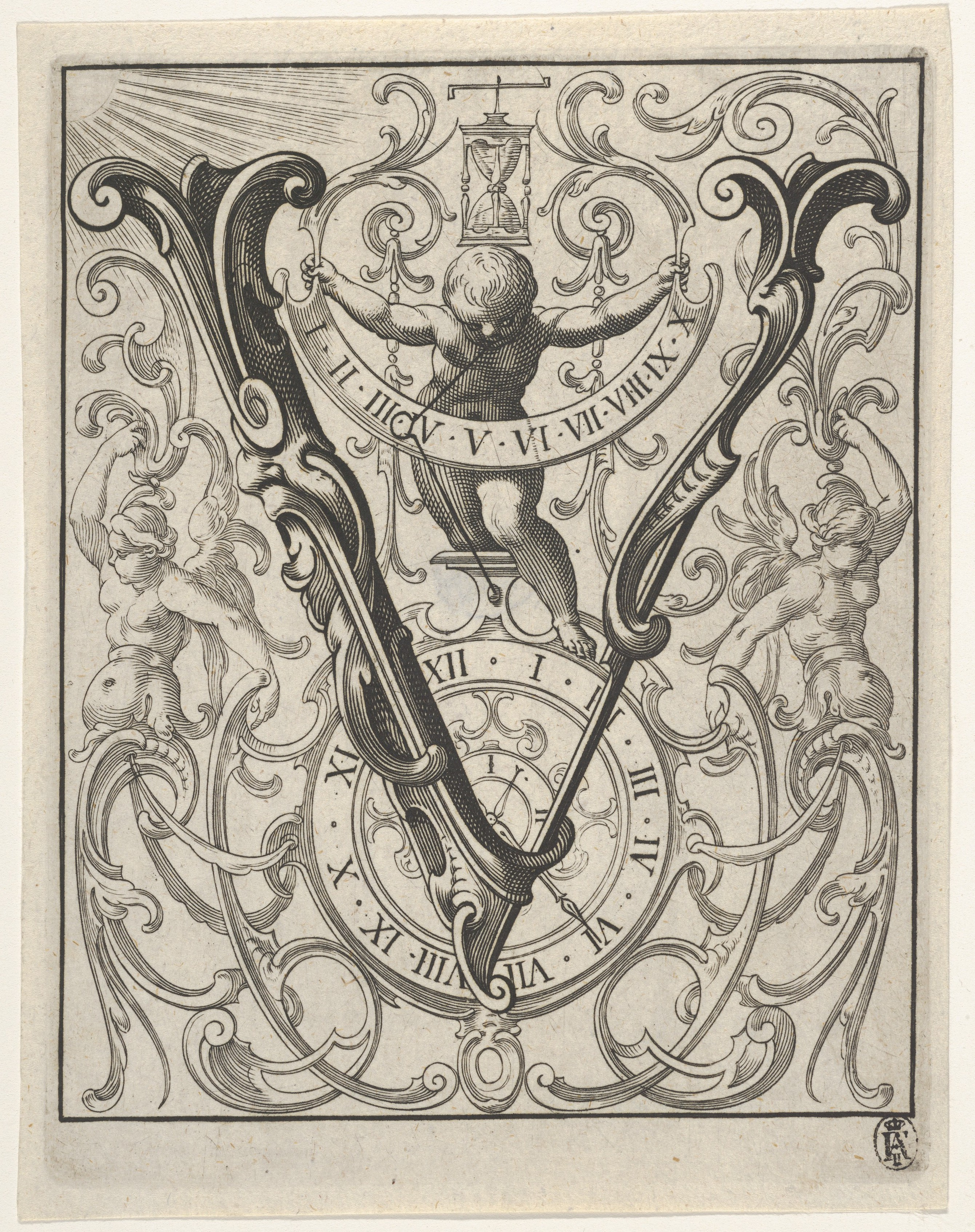 Book; Books